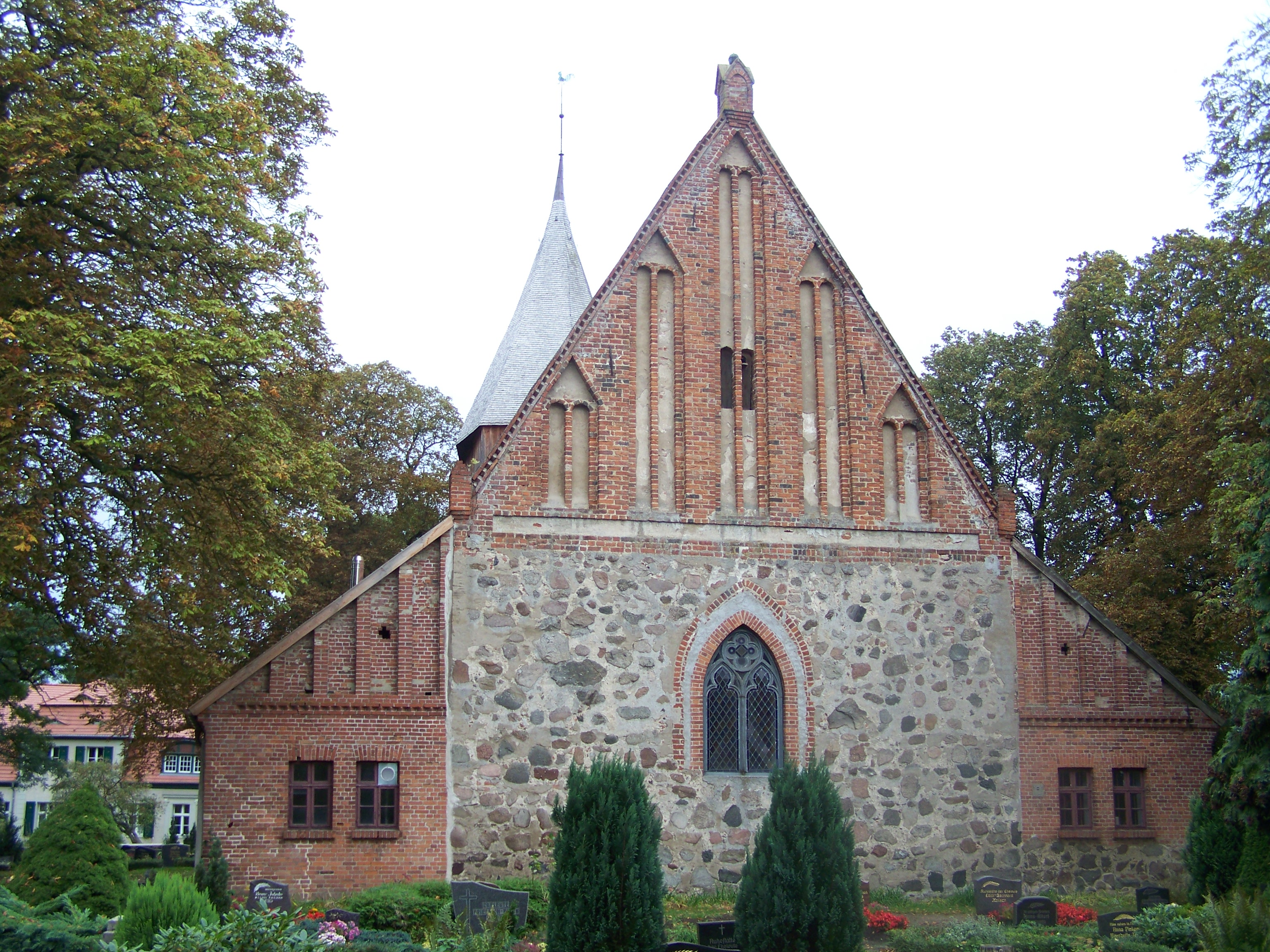 Kirche in Dersekow, Ansicht (2009-10-03)